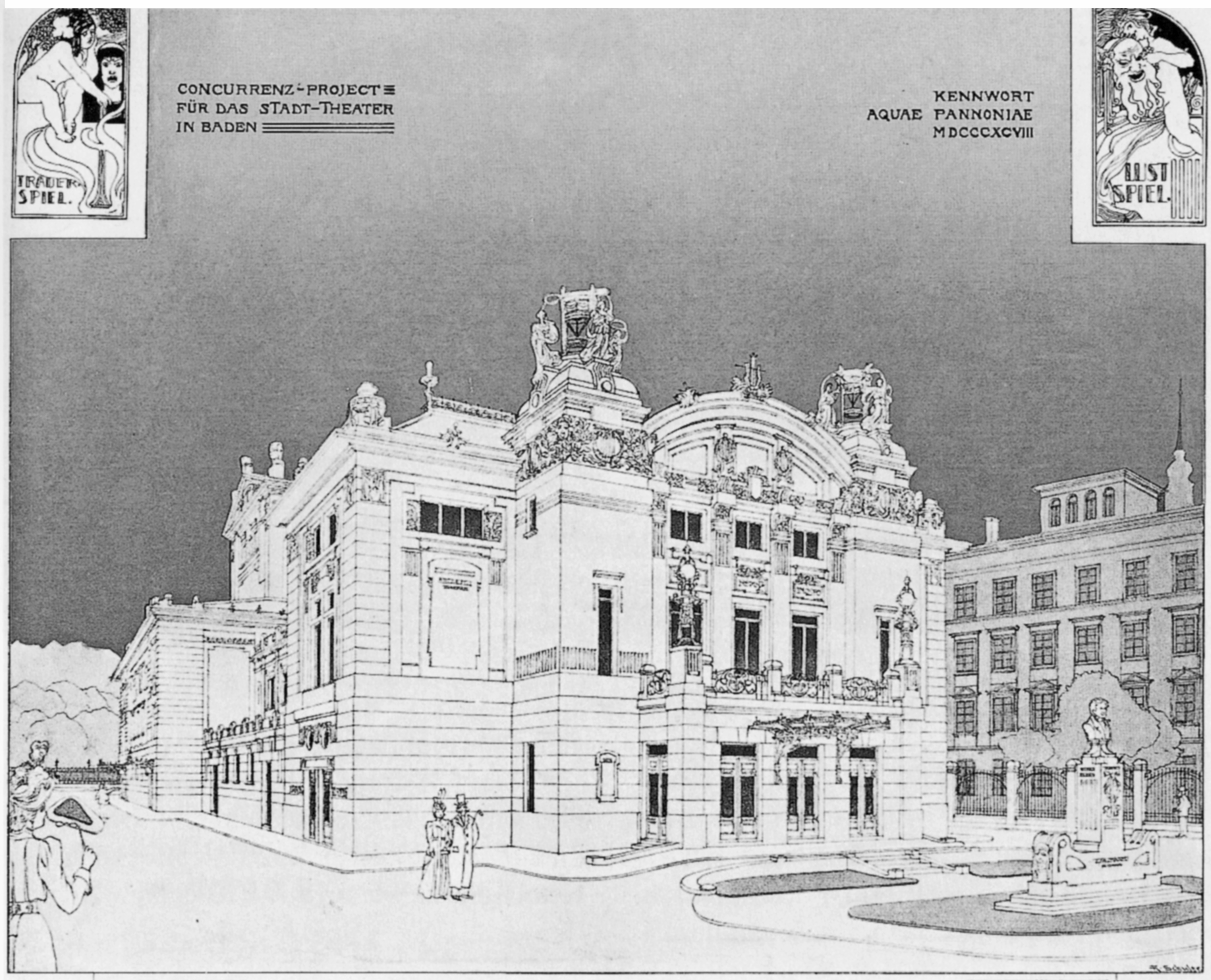 Baden bei Wien, Stadttheater, Entwurf Hackhofer & Schieder